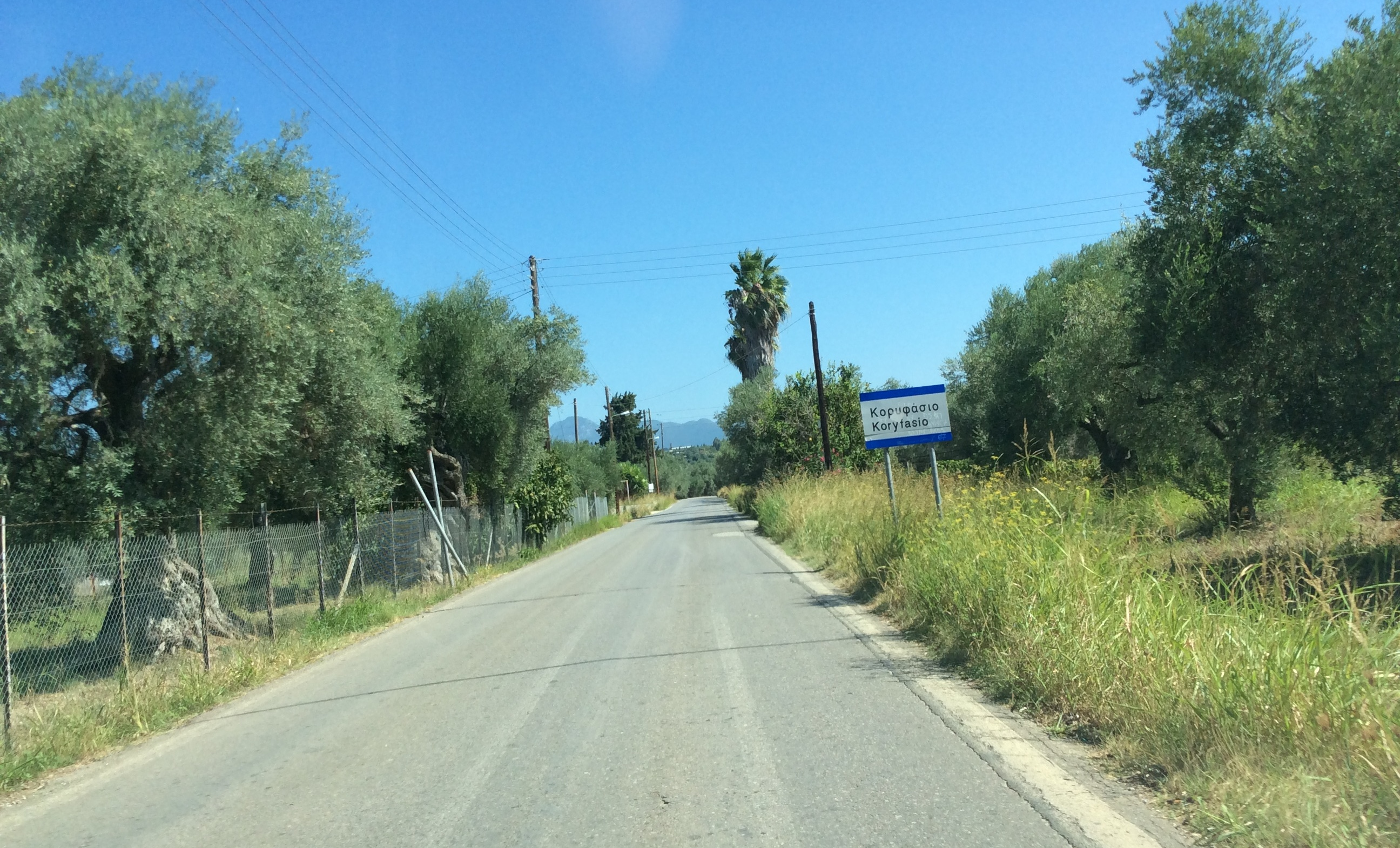 Κορυφάσιο Μεσσηνίας. Νότια είσοδος στο χωριό, από το δρόμο Πύλου - Χώρας.